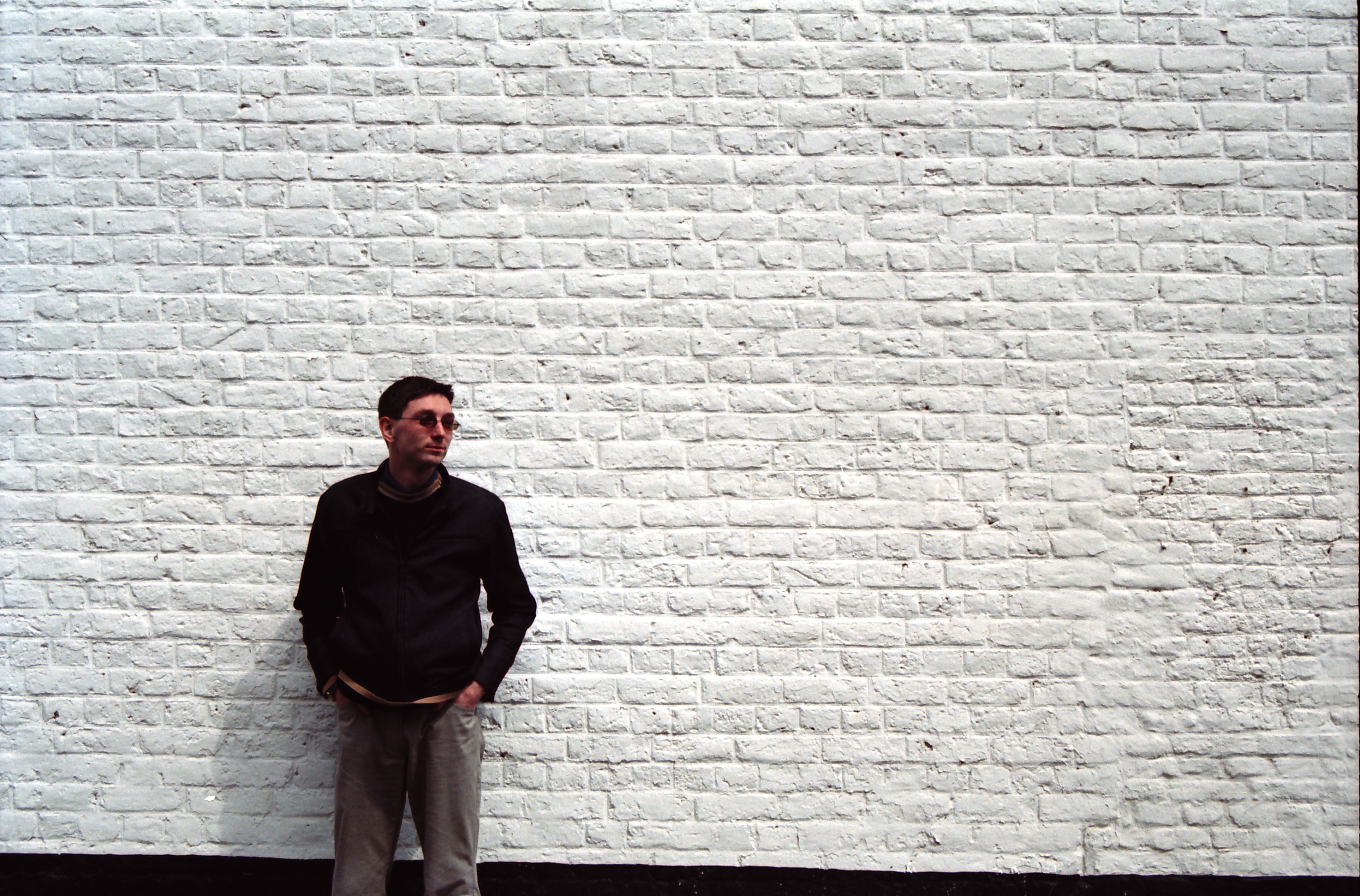 Hadonos v Bruselu